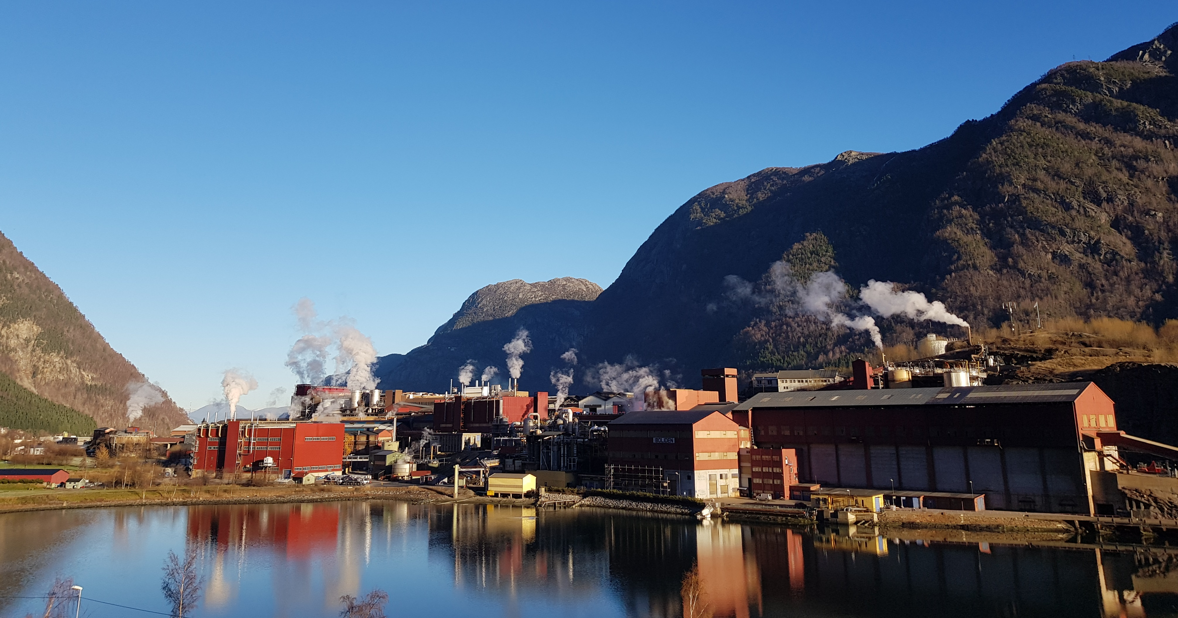 Boliden Odda AS med Eitrheimsvågen i forgrunn.